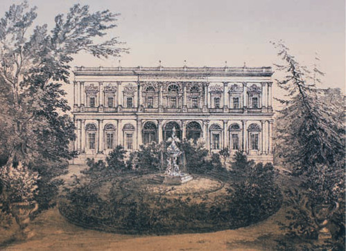 Palacio del Marqués de Salamanca en Recoletos, de Andreas Pic de Leopold (1789 - 1860). Museo de Historia de Madrid